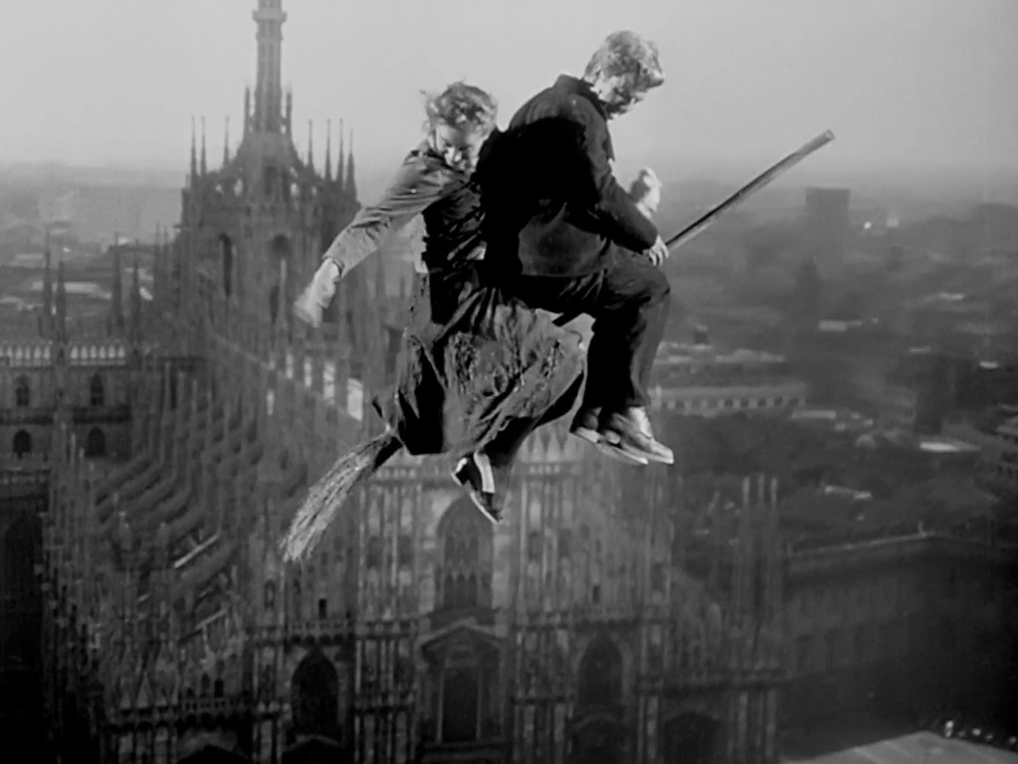 scena dal film Miracolo a Milano